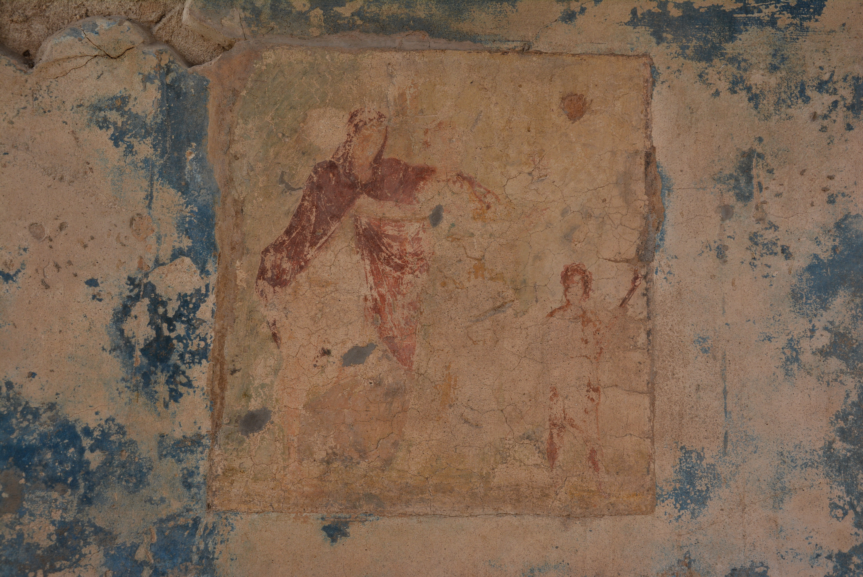 Casa di Marco Lucrezio - MIBACT This is a photo of a monument which is part of cultural heritage of Italy.